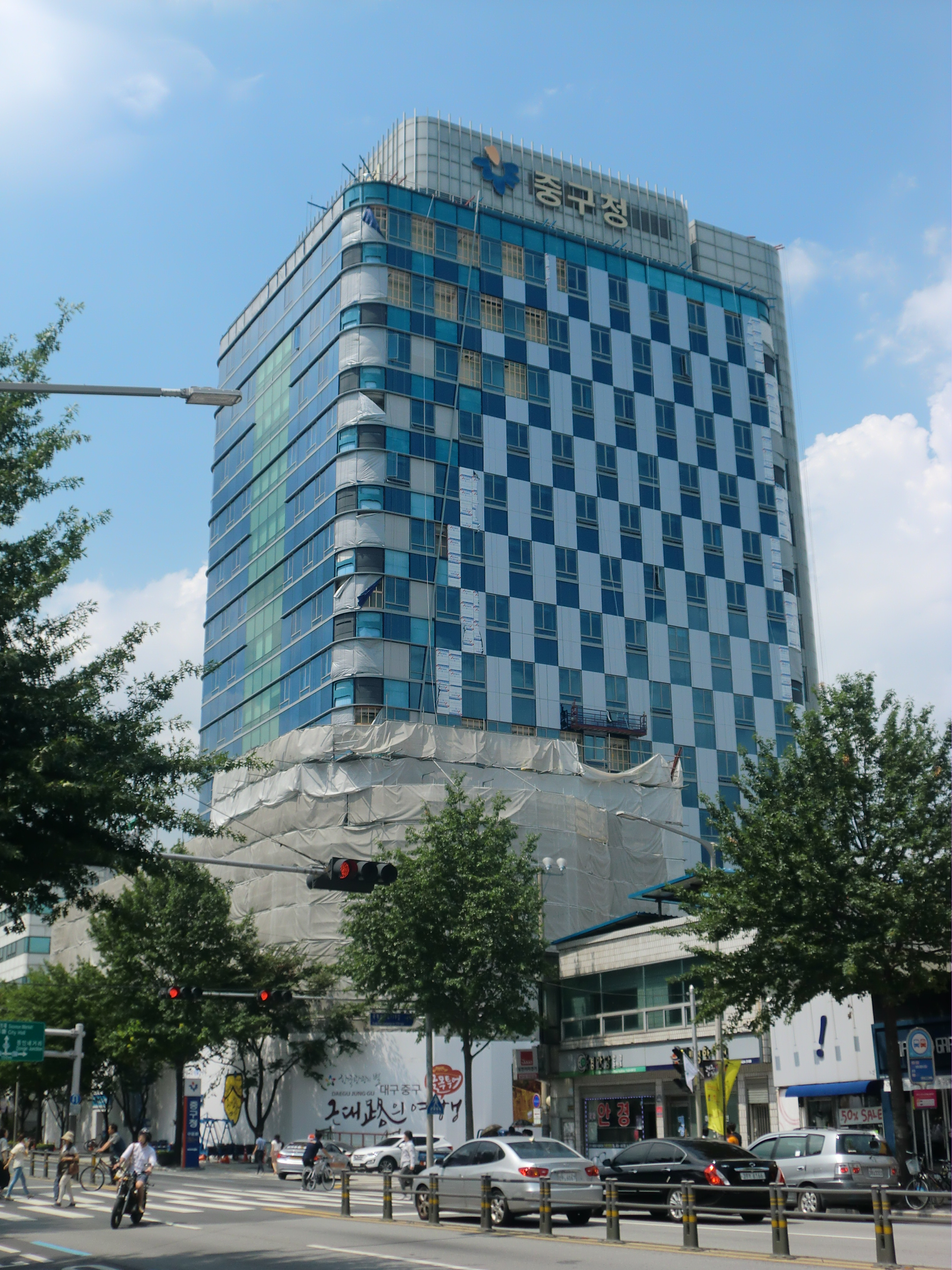 대구광역시 중구에 있는 중구청